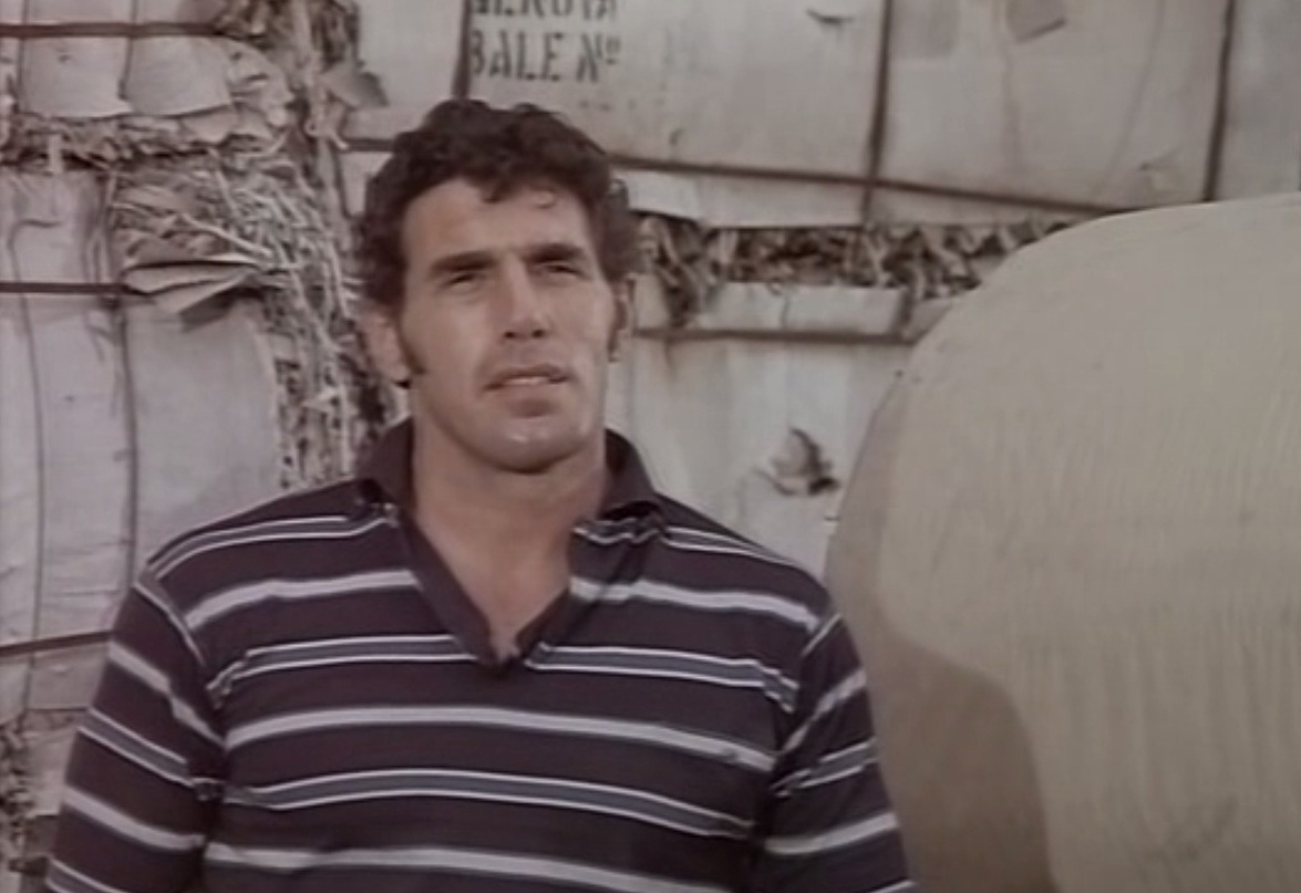 screenshot from the film Straziami, ma di baci saziami (1968)